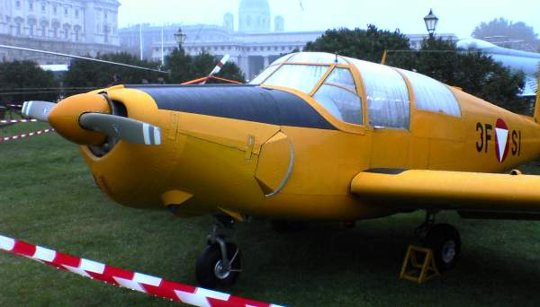 Schulflugzeug Saab Safir des Österreichischen Bundesheers